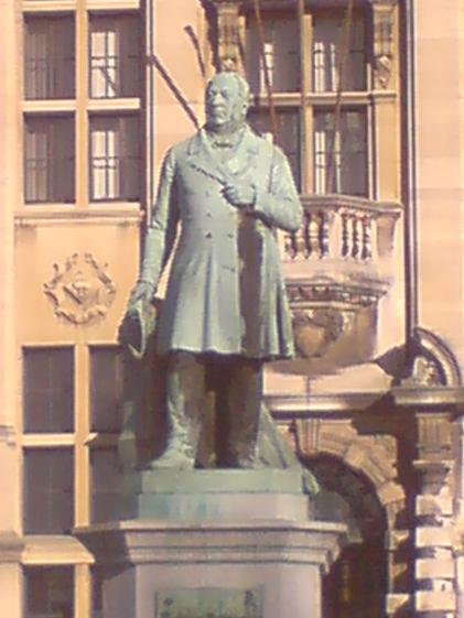 Statue of Theodore Verhaegen in Brussels